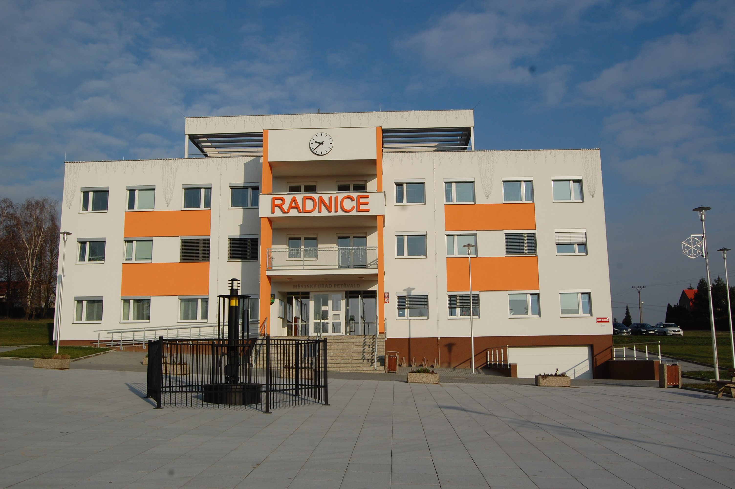 Radnice města Petřvald u Karviné.